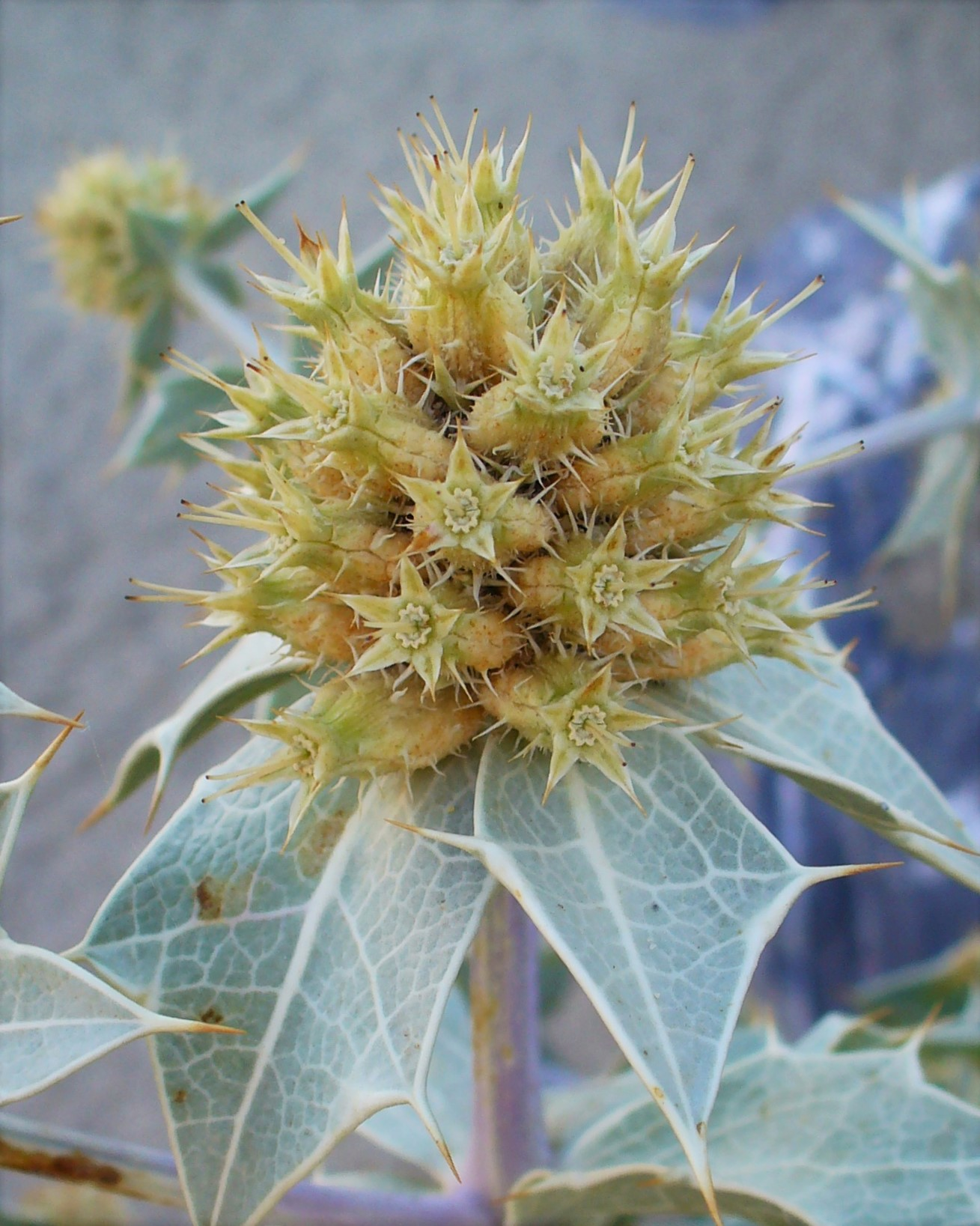 Eryngium maritimum, Apiaceae, Sea Holly, infrutescence; Port Leucate, France. The fresh plant is used in homeopathy as remedy: Eryngium maritimum (Ery-m.)